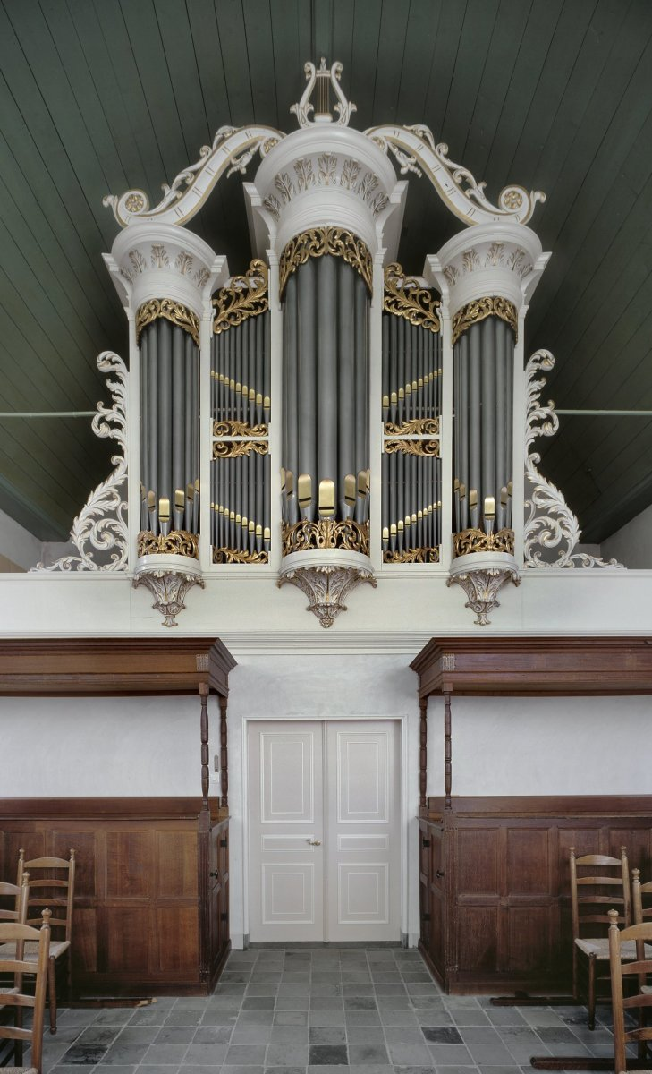 Nederlands Hervormde Kerk: Interieur, aanzicht orgel, orgelnummer 1497 (opmerking: Gefotografeerd voor Het Historische Orgel in Nederland 1850-1858)